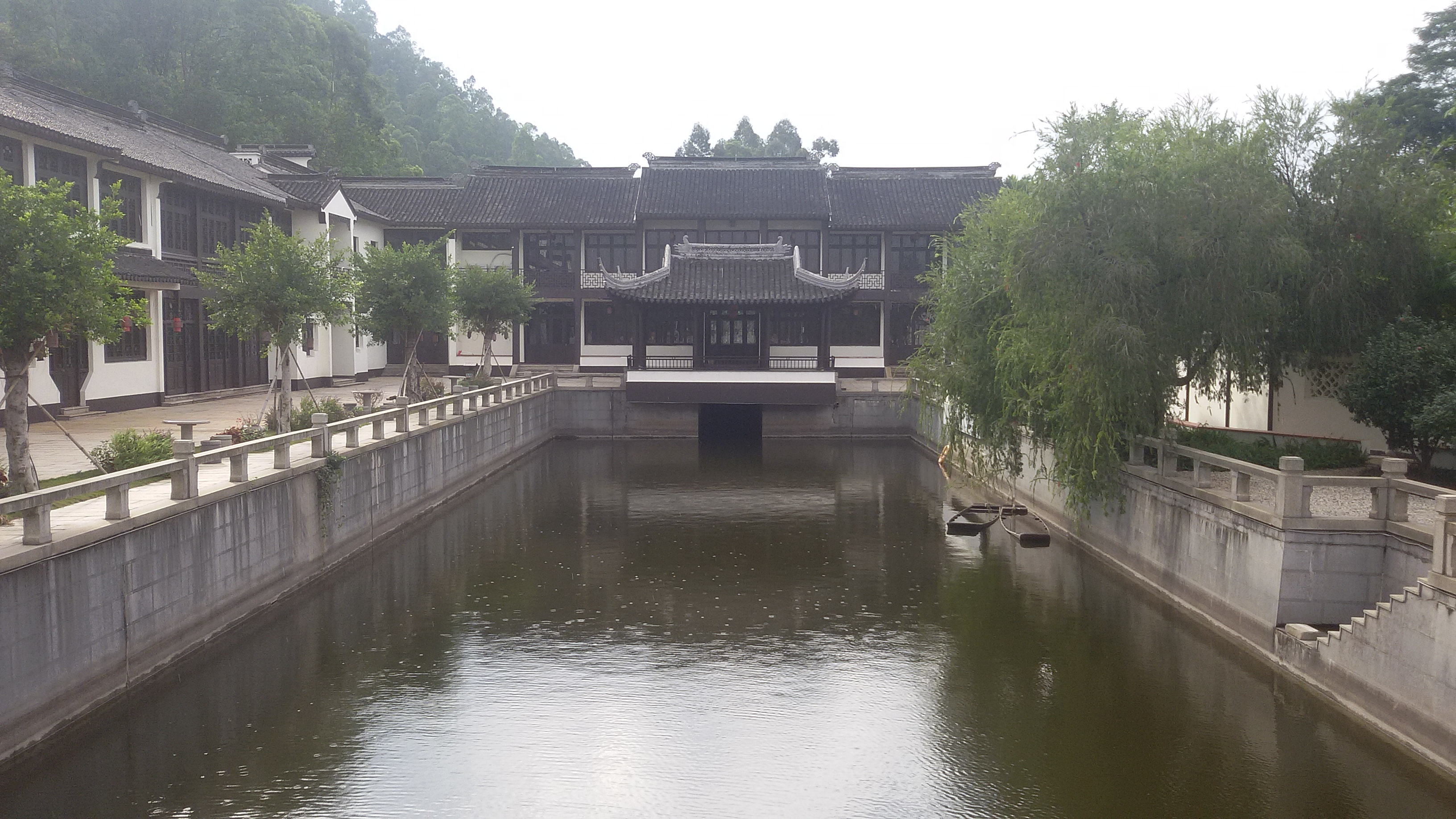 粵語: 喺蒲州花園入面啲仿蘇州園林式嘅中式建築